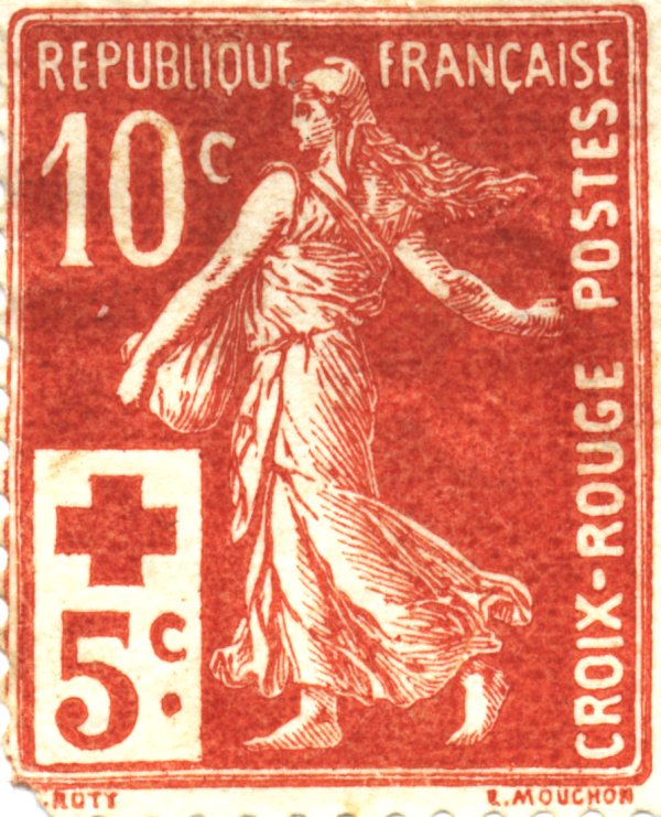 Timbre français type Semeuse camée, avec surtaxe au bénéfice de la Croix-Rouge. Premier timbre à surtaxe de France